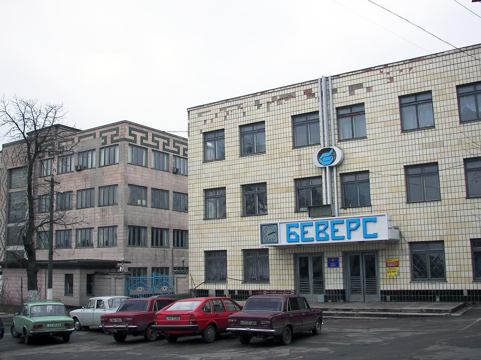 Прохідна заводу "Беверс"